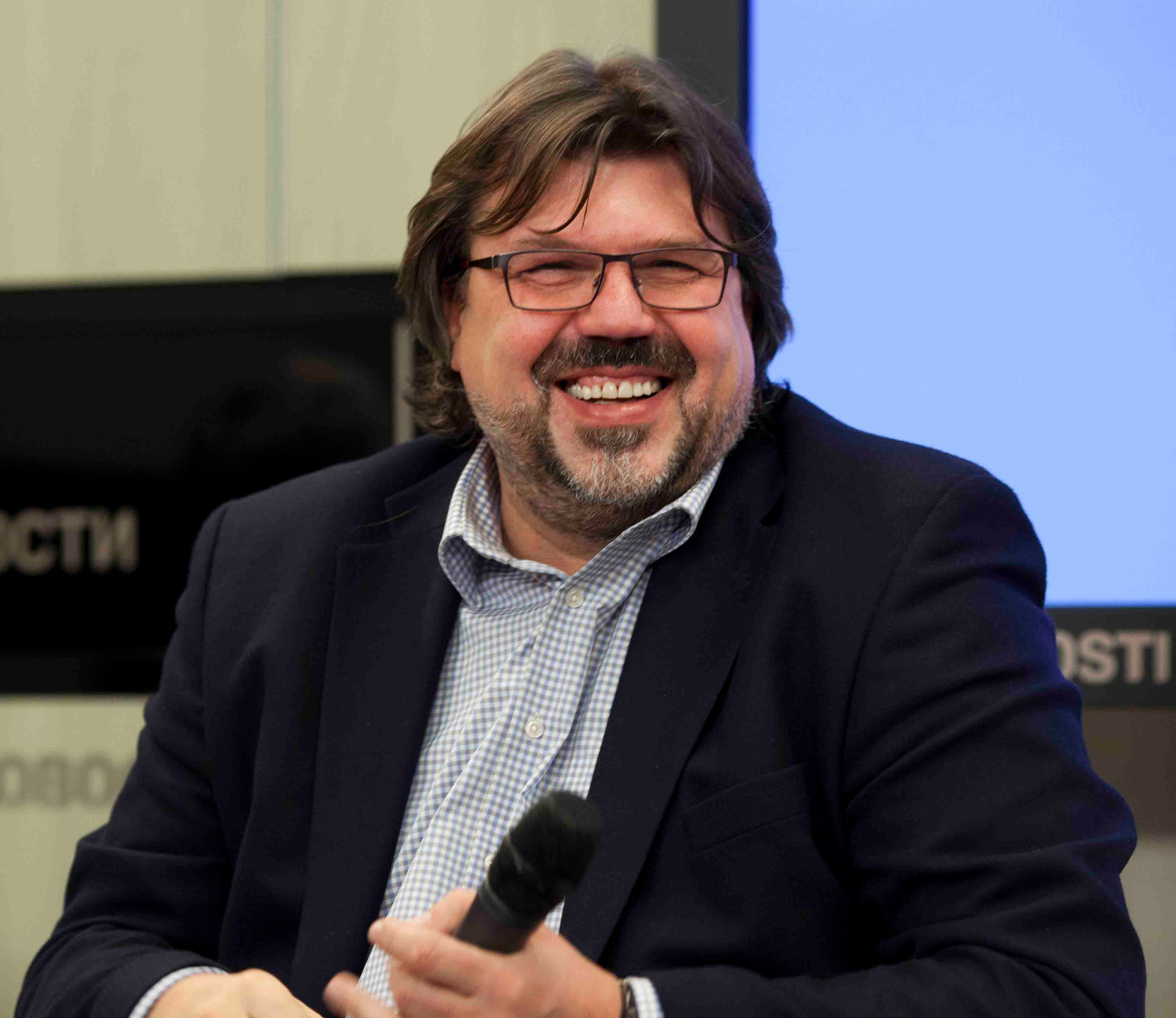 Бут, Вениамин Евгеньевич